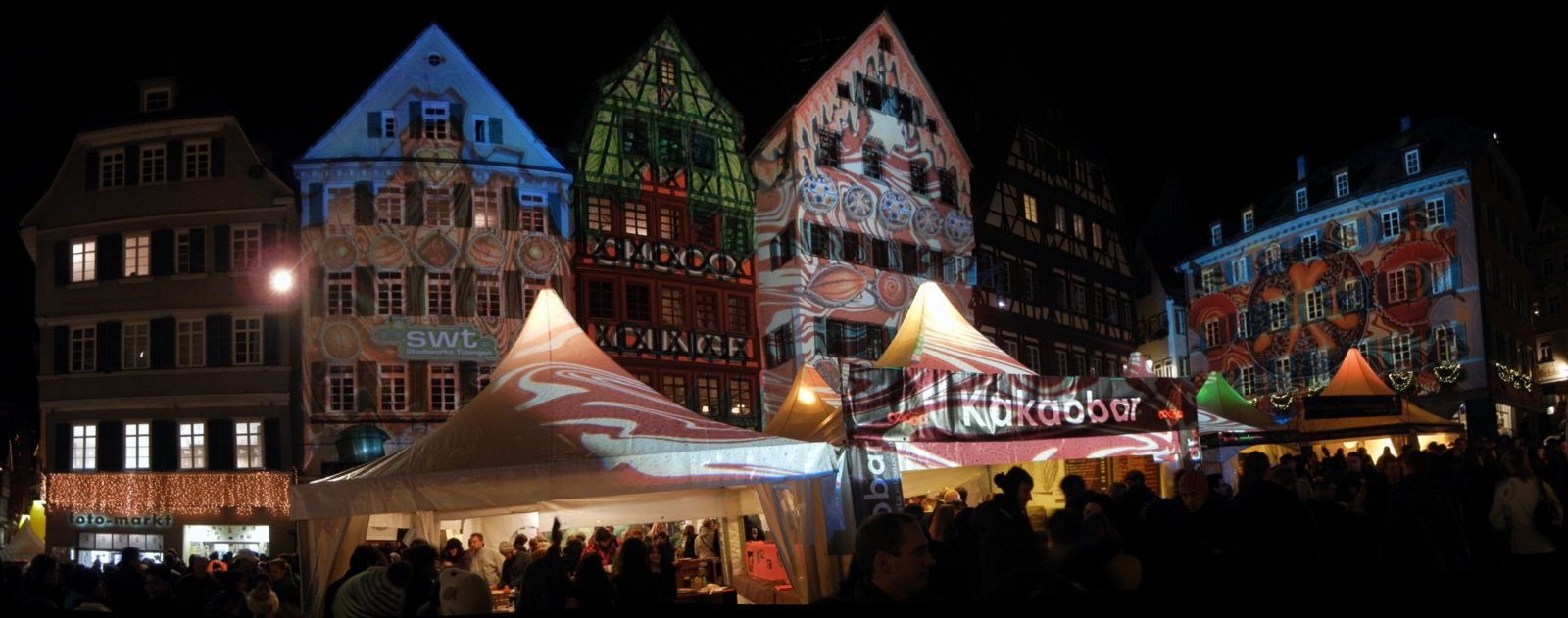 ChocolART Schokoladenfestival auf dem Tübinger Marktplatz im Dezember 2011. Der Name spielt auf französisch mit den Begriffen Chocolat=Schokolade und Art=Kunst.